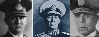 Three Argentine Presidents (1943-1946): Arturo Rawson, Pedro Pablo Ramírez, Edelmiro Farrell. 1943 Revolution.